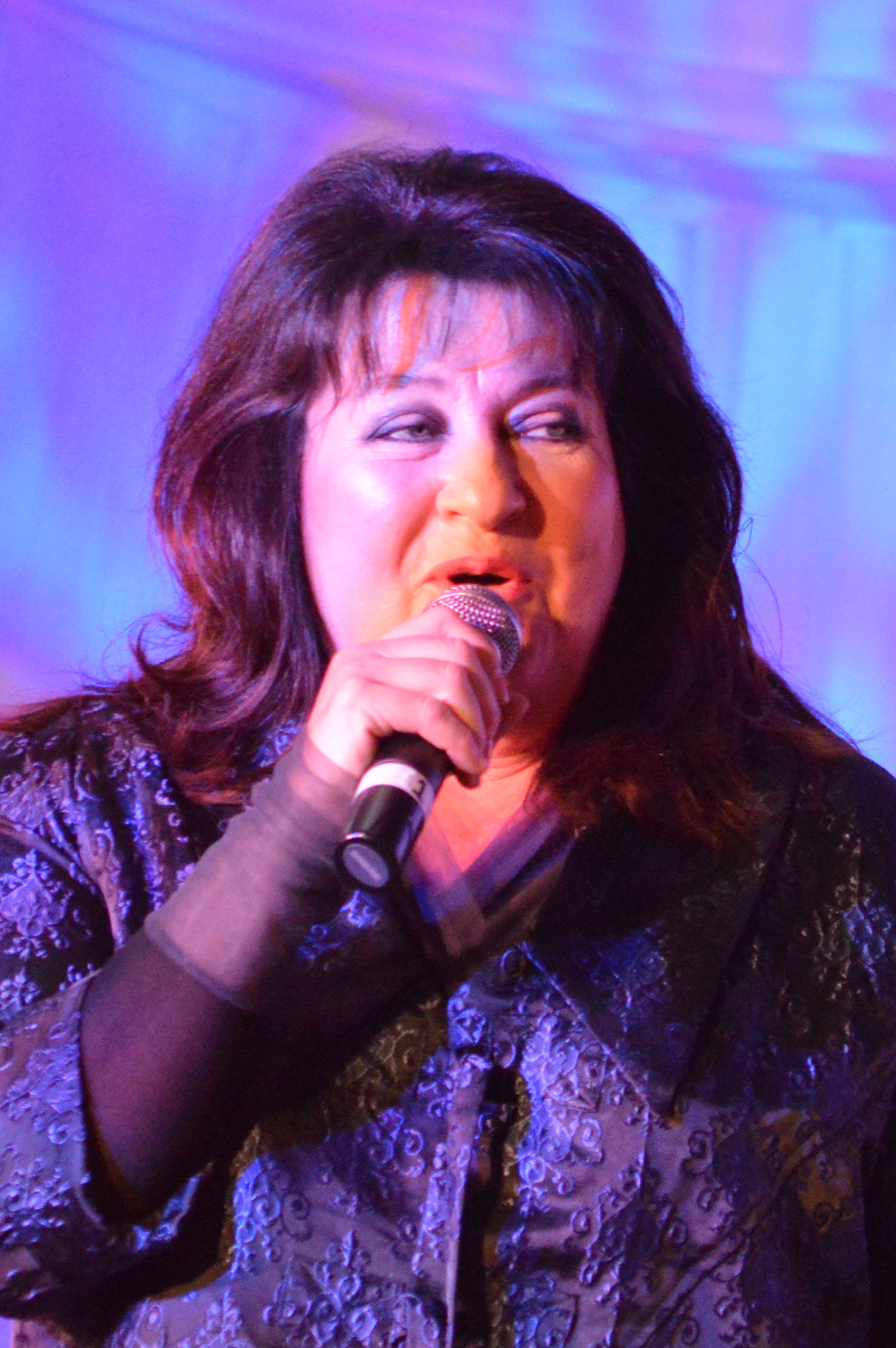 Laurika Rauch sing tydens Die Burger se 100ste verjaardagviering by die Media24-sentrum, 25 Julie 2015